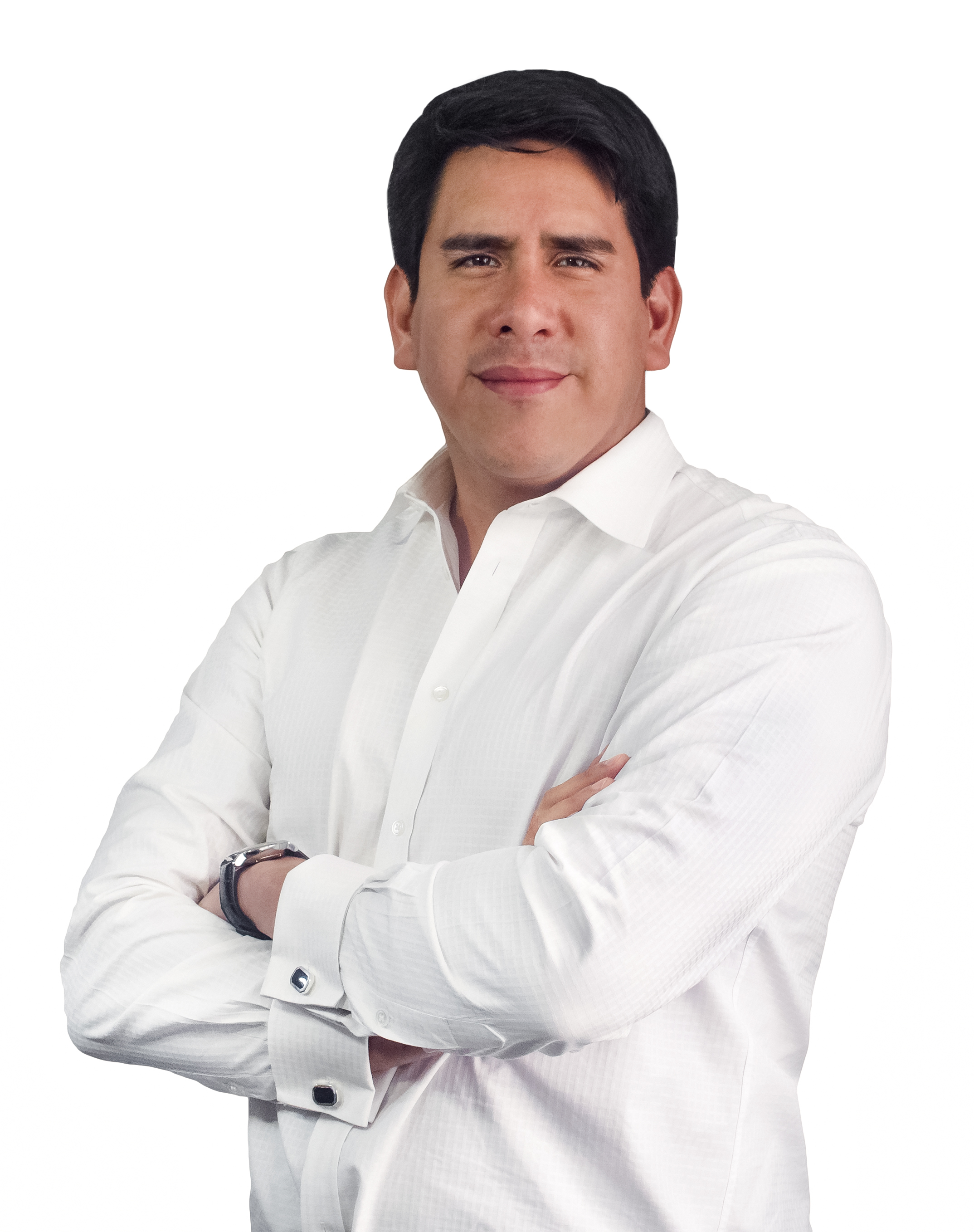 Carlomagno Chacón, Alcalde de Magdalena del Mar. Periodo 2019 - 2022